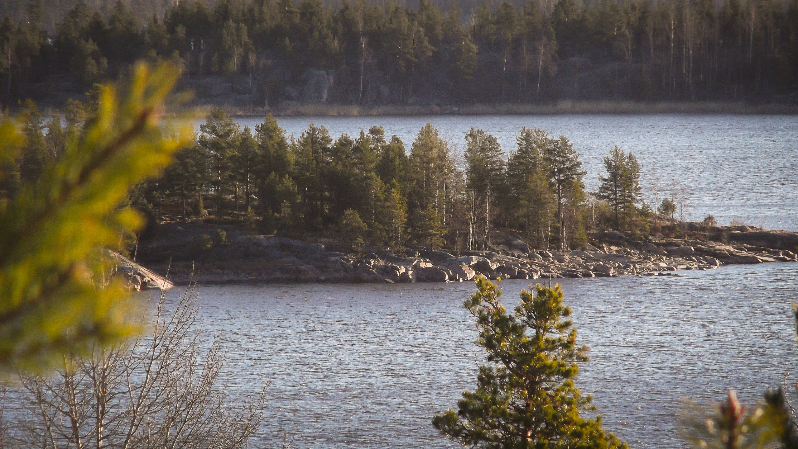 Кузнечное заказник, Приозерский район This image is related to the protected area of Russia number 4710162